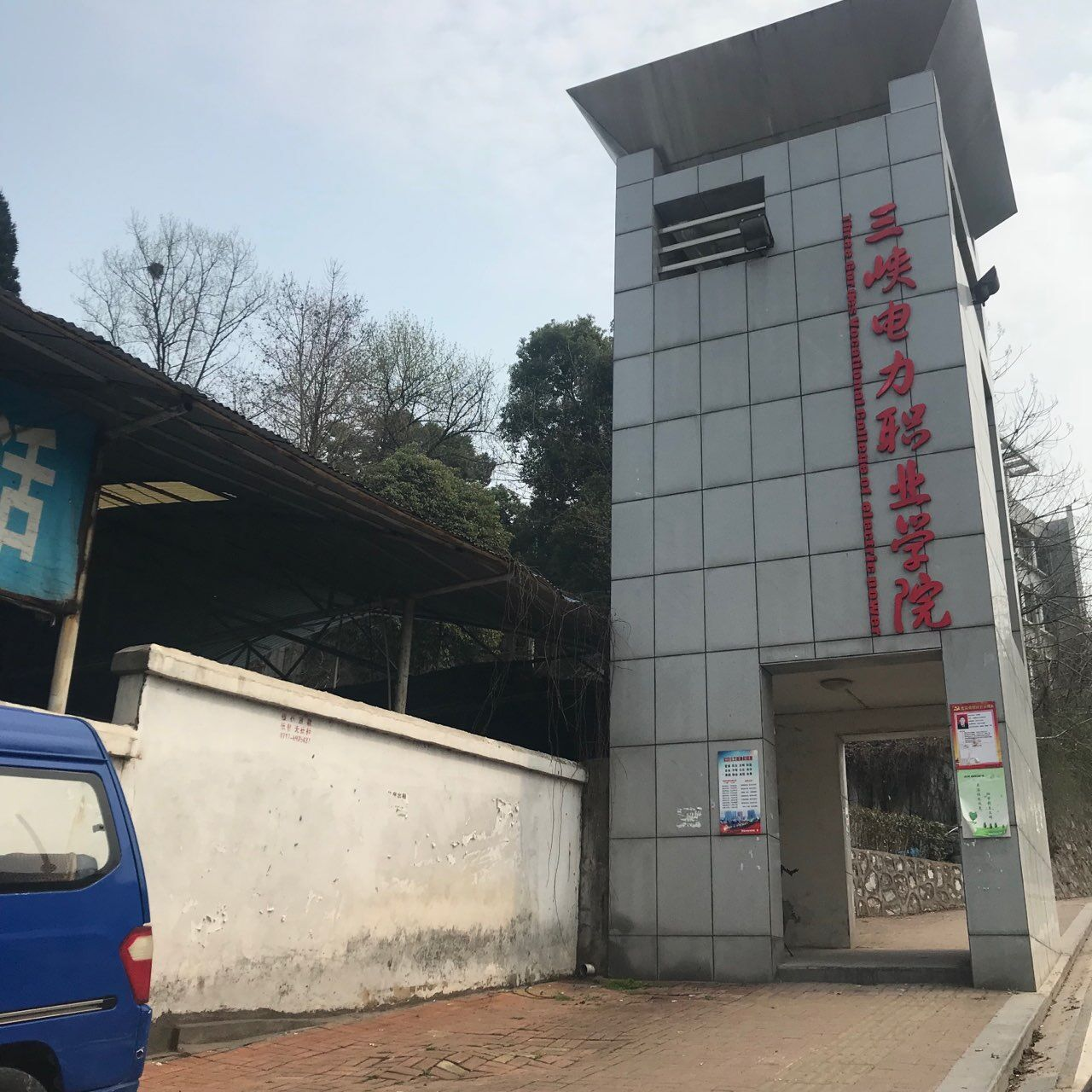 三峡电力职业学院西门